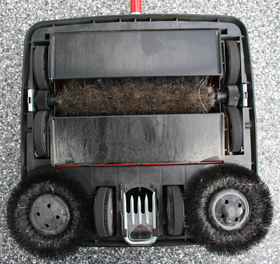 Leifheit rotaro S, Teppichdackel, unten